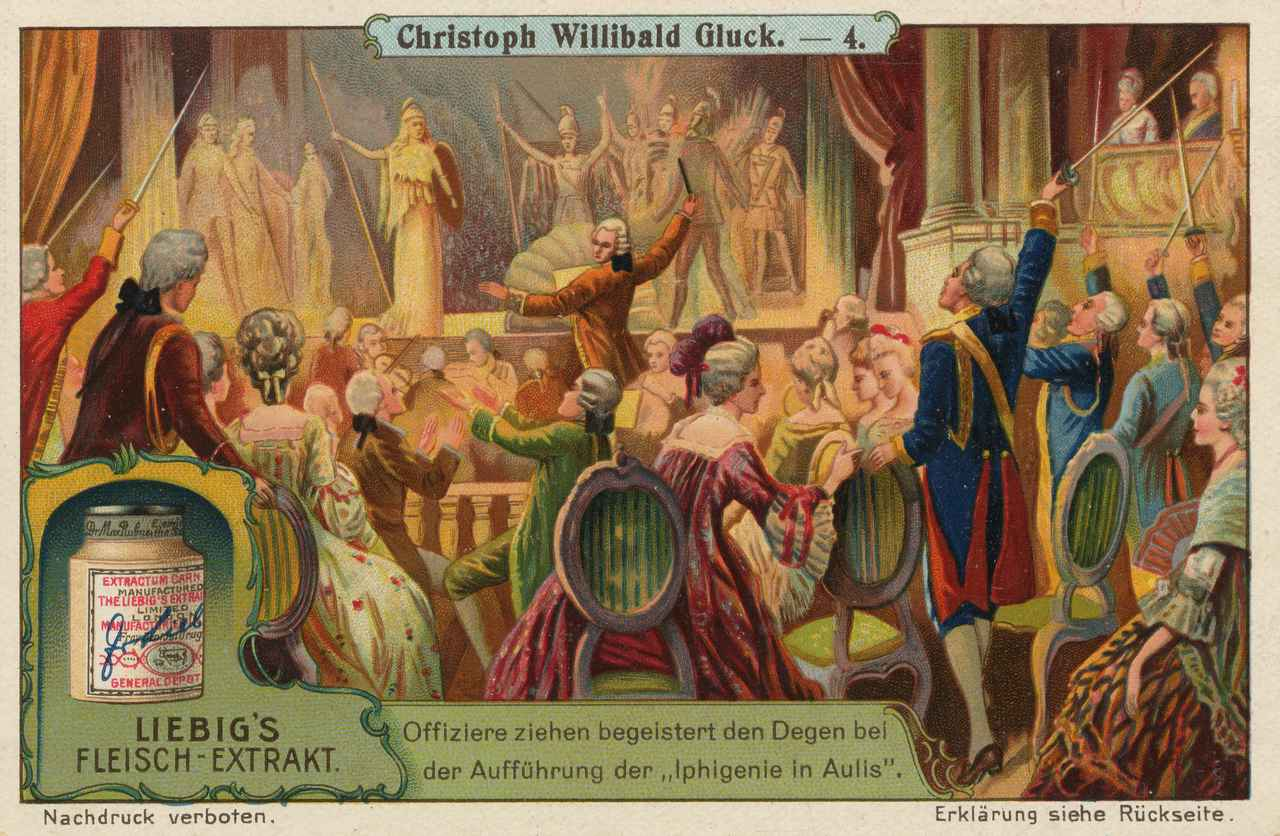 4: Offiziere ziehen begeistert ihre Degen bei der Aufführung der »Iphigenie in Aulis«. Glucks bisherige Opern waren ganz im herkömmlichen Stil der damaligen italienischen Schule gehalten. Sie wurden daher auch von den Zeitgenossen sehr beifällig aufgenommen, und der Papst verlieh dem Verfasser sogar den Orden vom goldenen Sporn. Allmählich aber trat ein Wandel in den Kunstanschauungen Glucks ein und er trachtete nunmehr, die Oper von der Verflachung zu befreien, in die sie nach und nach geraten war. Da zu jener Zeit das dramatische Kunstinteresse zu Paris am lebhaftesten war, begab er sich dorthin, um seine Bestrebungen zur Geltung zu bringen. Mit der ersten durchweg nach den neuen Prinzipien geschaffenen Oper »Iphigenie in Aulis« errang er einen ungeheuren Erfolg, doch dauerte es noch mehrere Jahre, ehe der Einfluss Piccinis und seiner Anhänger, der Hauptgegner der neuen Richtung, überwunden war.